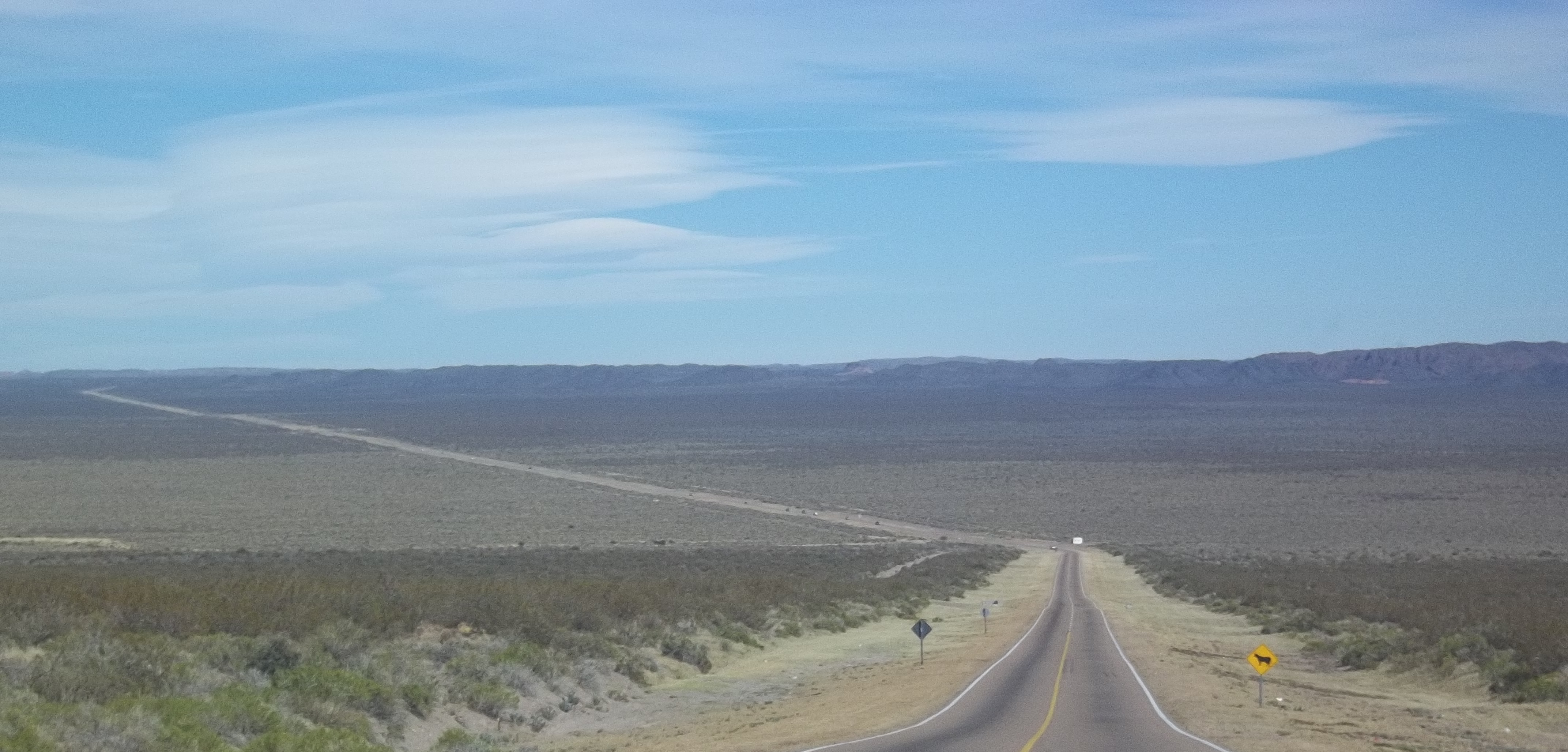 Ruta Nacional 40 en su paso por la Provincia de Mendoza, Argentina